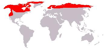 Bewerking afbeelding: Afbeelding_(kaart).JPG